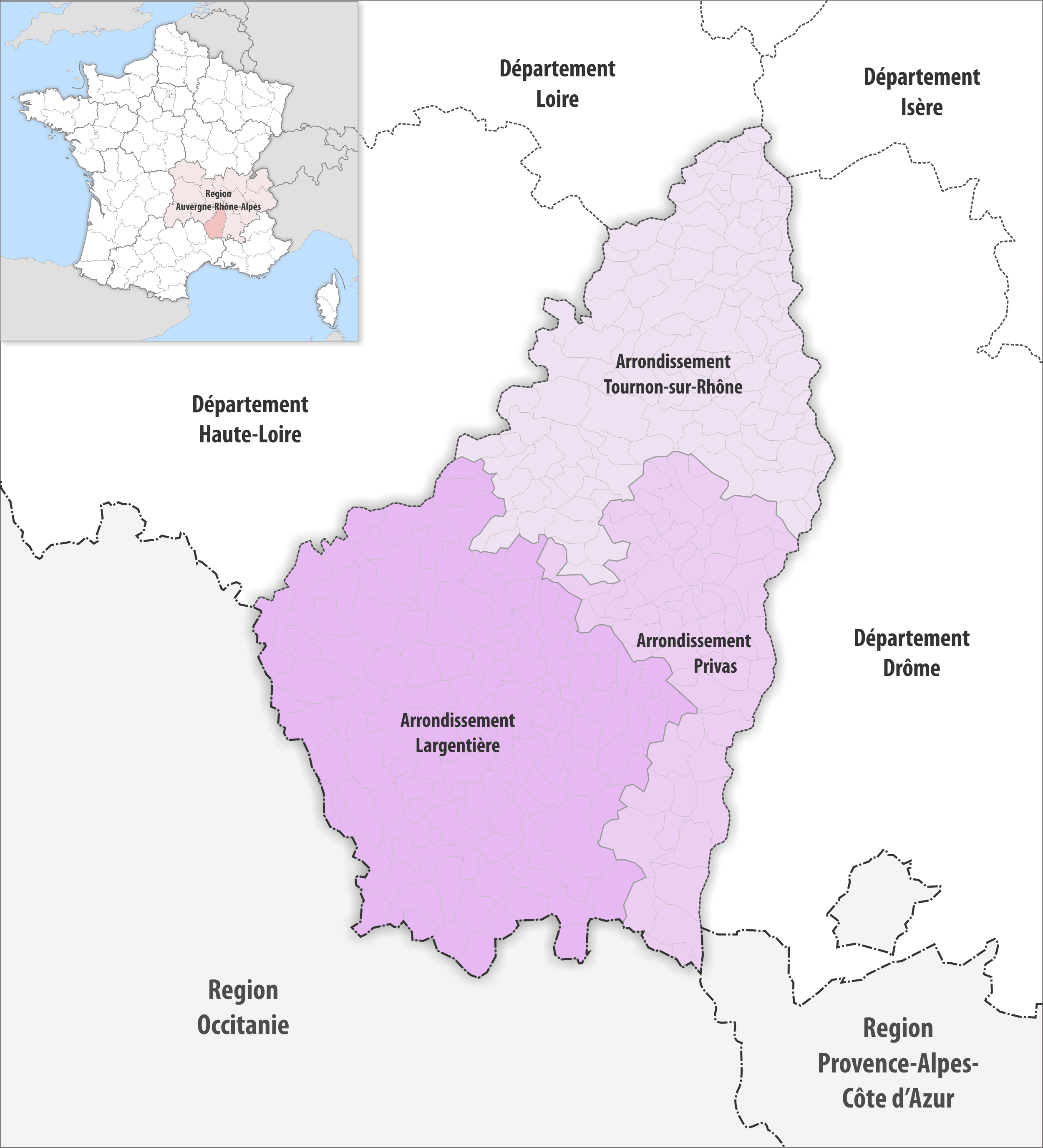 Gemeinden und Arrondissemente im Departement Ardèche